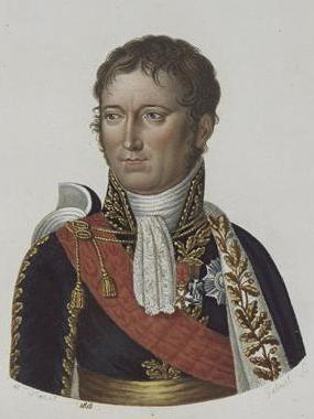 Adolphe Édouard Casimir Joseph Mortier (1768-1835), duc de Trévise, maréchal de France